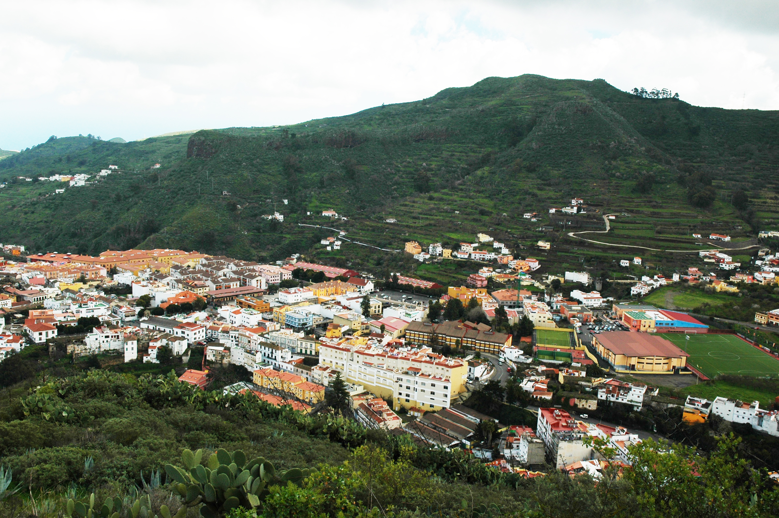 Vista de Vega de San Mateo desde Montaña Cabreja